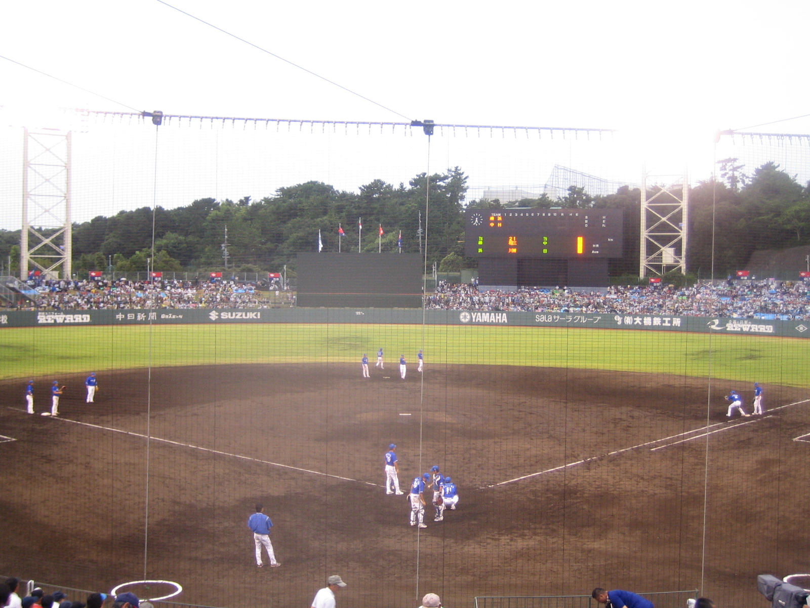 浜松市営球場